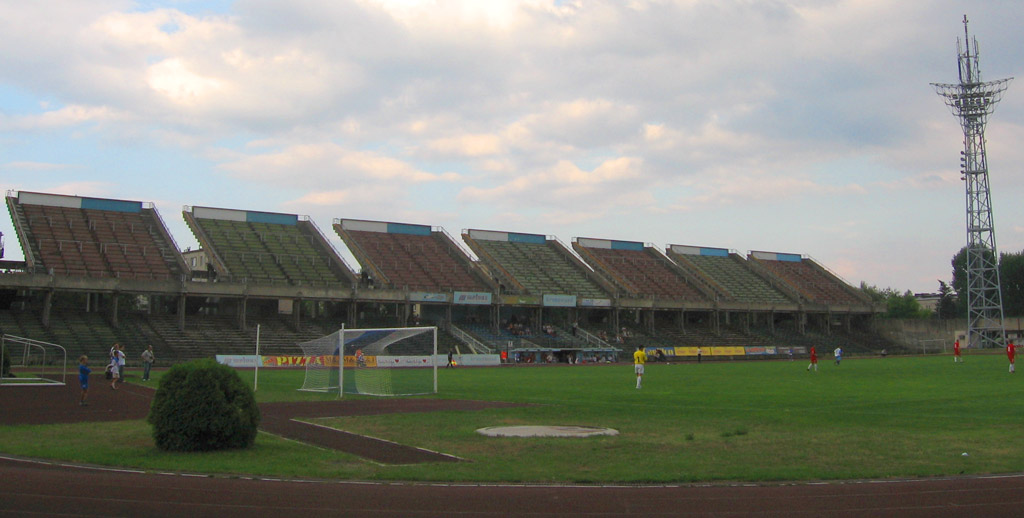 Wschodnia trybuna stadionu Stali Mielec, znajdująca się od strony ul. Solskiego.